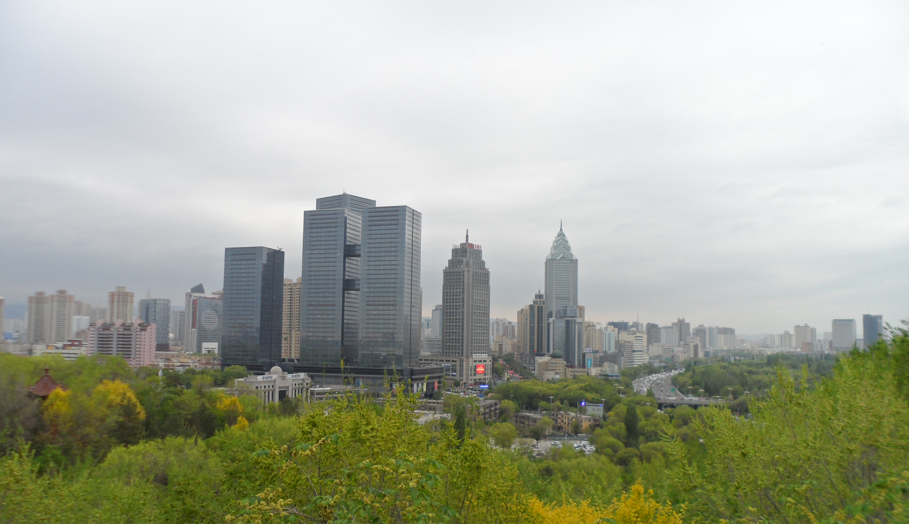 新疆乌鲁木齐市